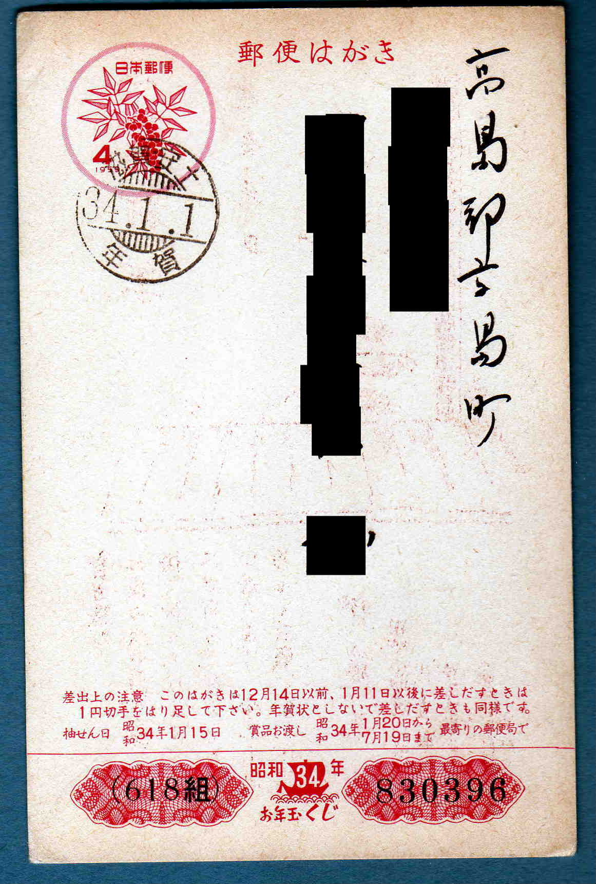 1959年用年賀葉書に、昭和34年1月1日滋賀県安土郵便局の年賀印が押された使用済葉書。住所氏名は個人情報があるため、見えないように加工している。